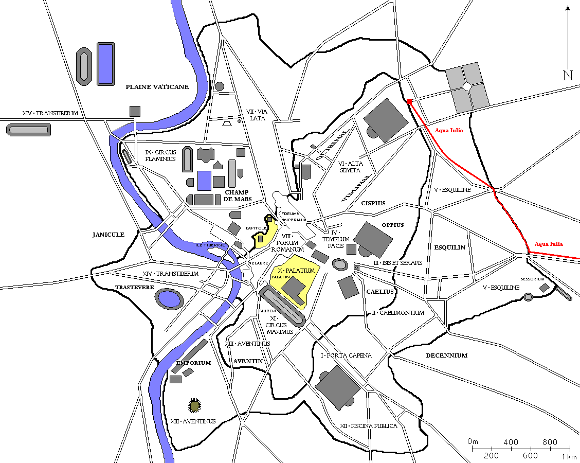 Plan de Rome avec l'Aqua Iulia en rouge.